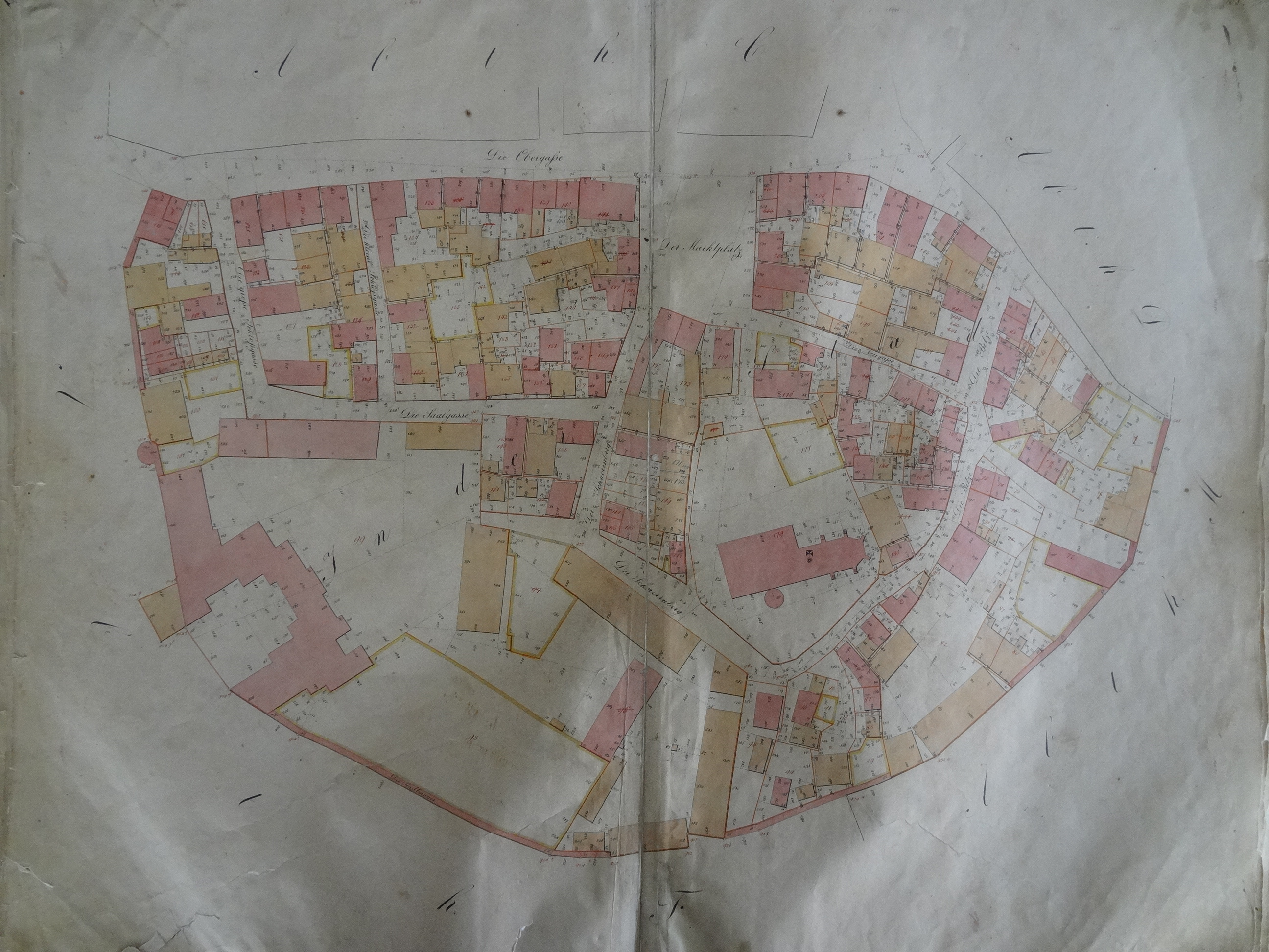 Parzellenkarten der Gemarkung Hungen, 1.Band, Provinz Oberhessen, Steuercommiseriat Hungen, Bearbeitet in den Jahren 1856-1862, Stadtarchiv Hungen